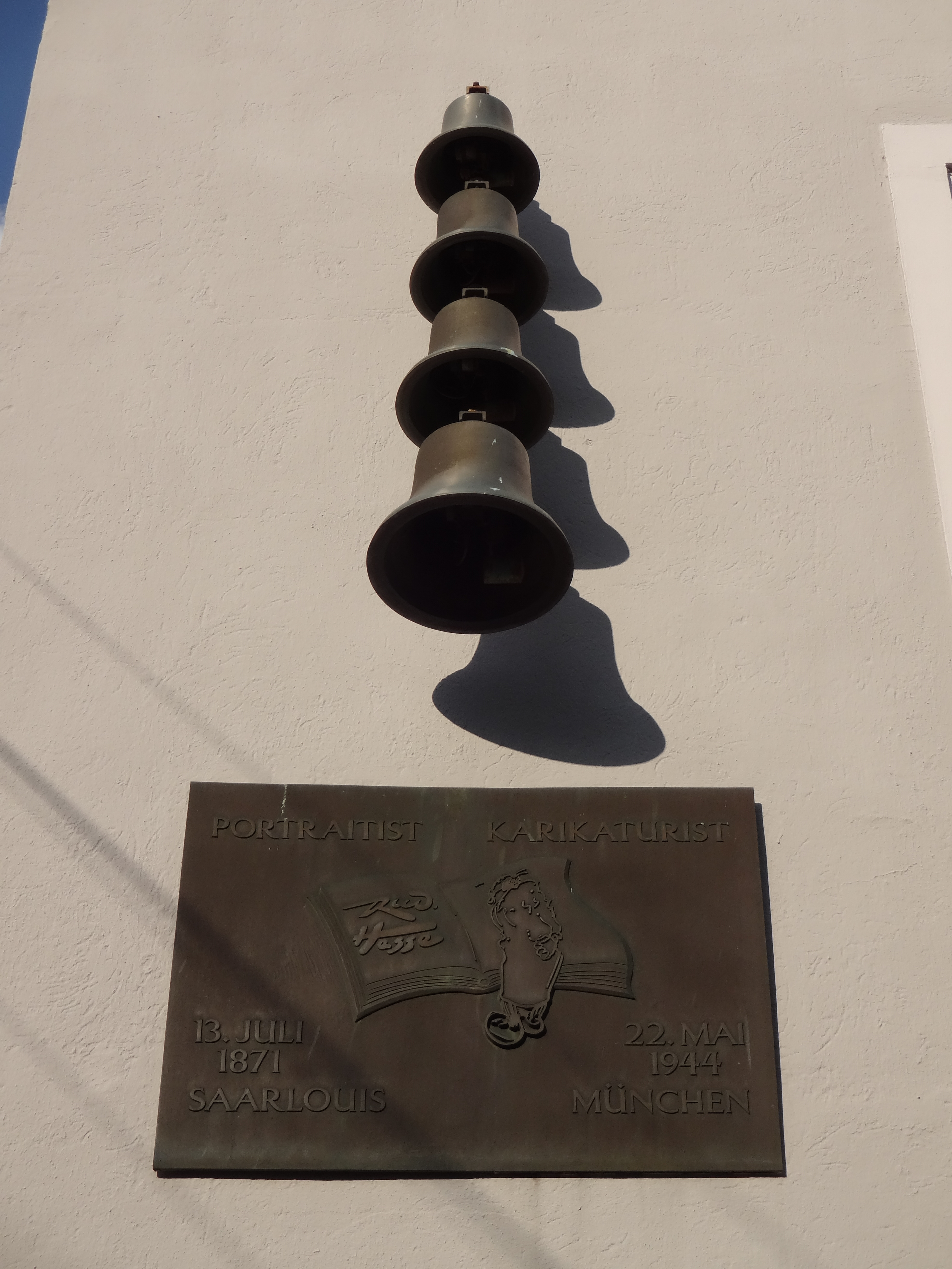 Gedenktafel für den Maler und Grafiker Rudolf Hesse in seiner Geburtsstadt Saarlouis an einem Haus Ecke Französische Straße/Kleiner Markt